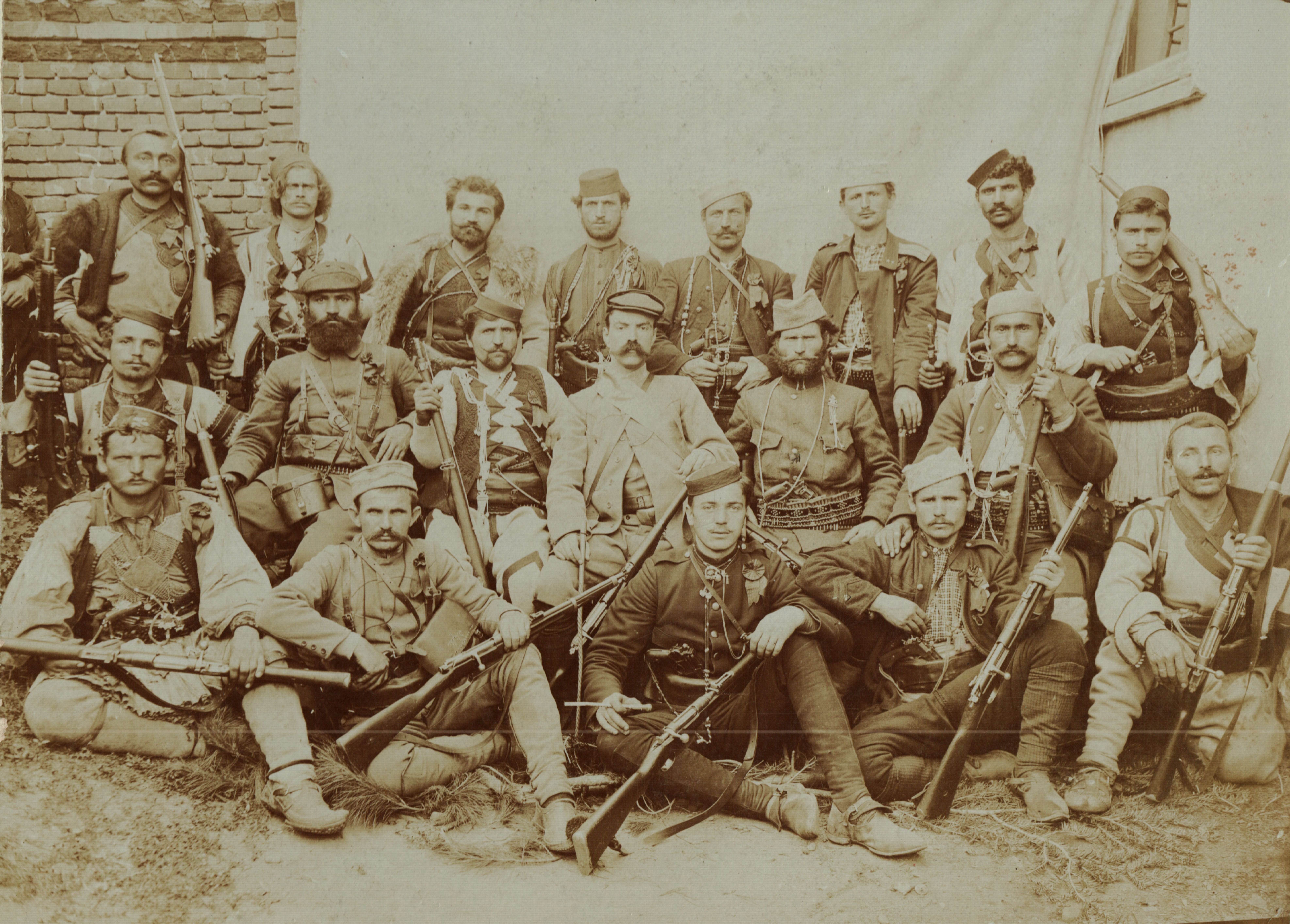 Снимка на четата на Милан Матов, председател на Битолски революционен окръг и войводите заедно